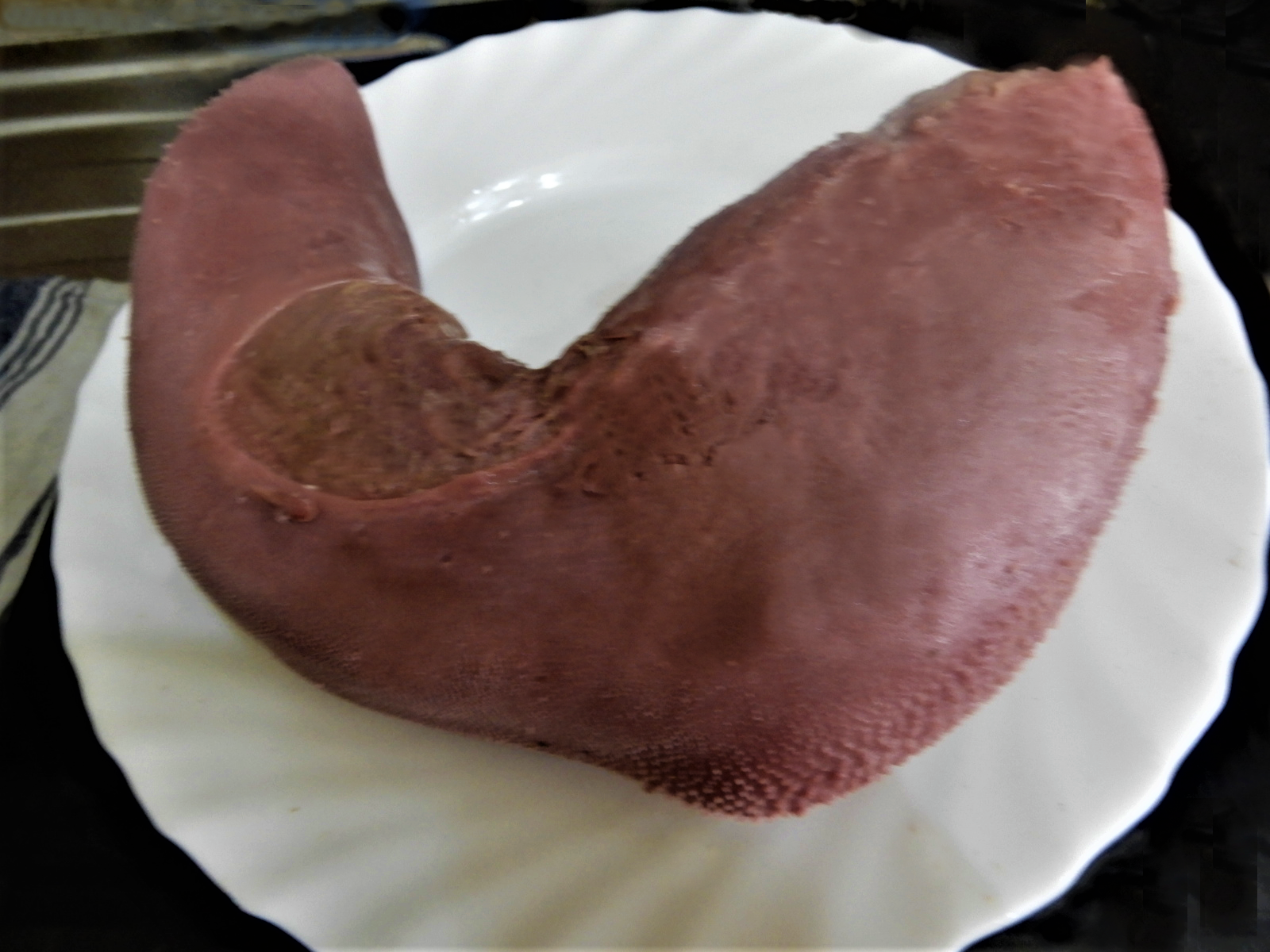 Rindszunge gekocht und enthäutet